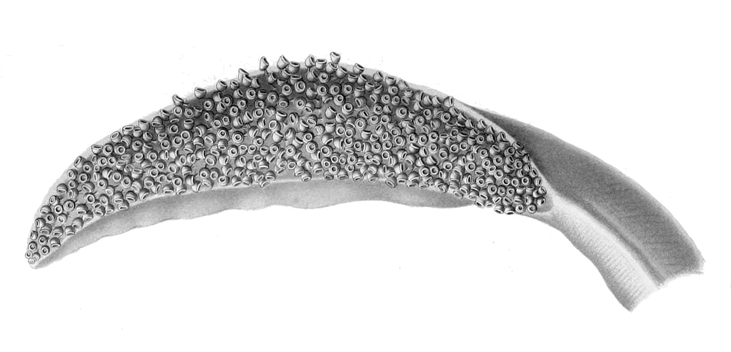 Oral view of tentacular club of Spirula spirula